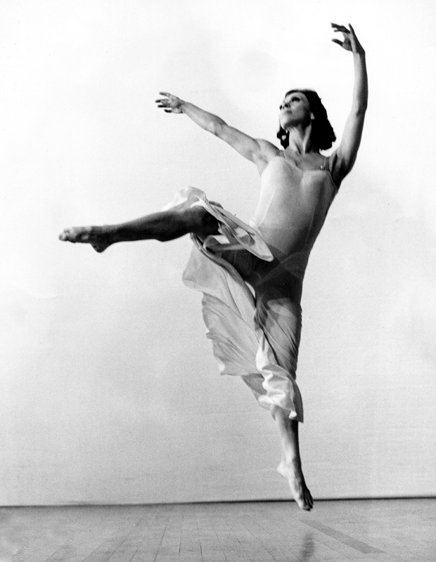 מתוך היצירה "שעשועי מלאכים", 1966; כוריאוגרפיה: מרתה גרהם (באדיבות להקת מחול בת-שבע)